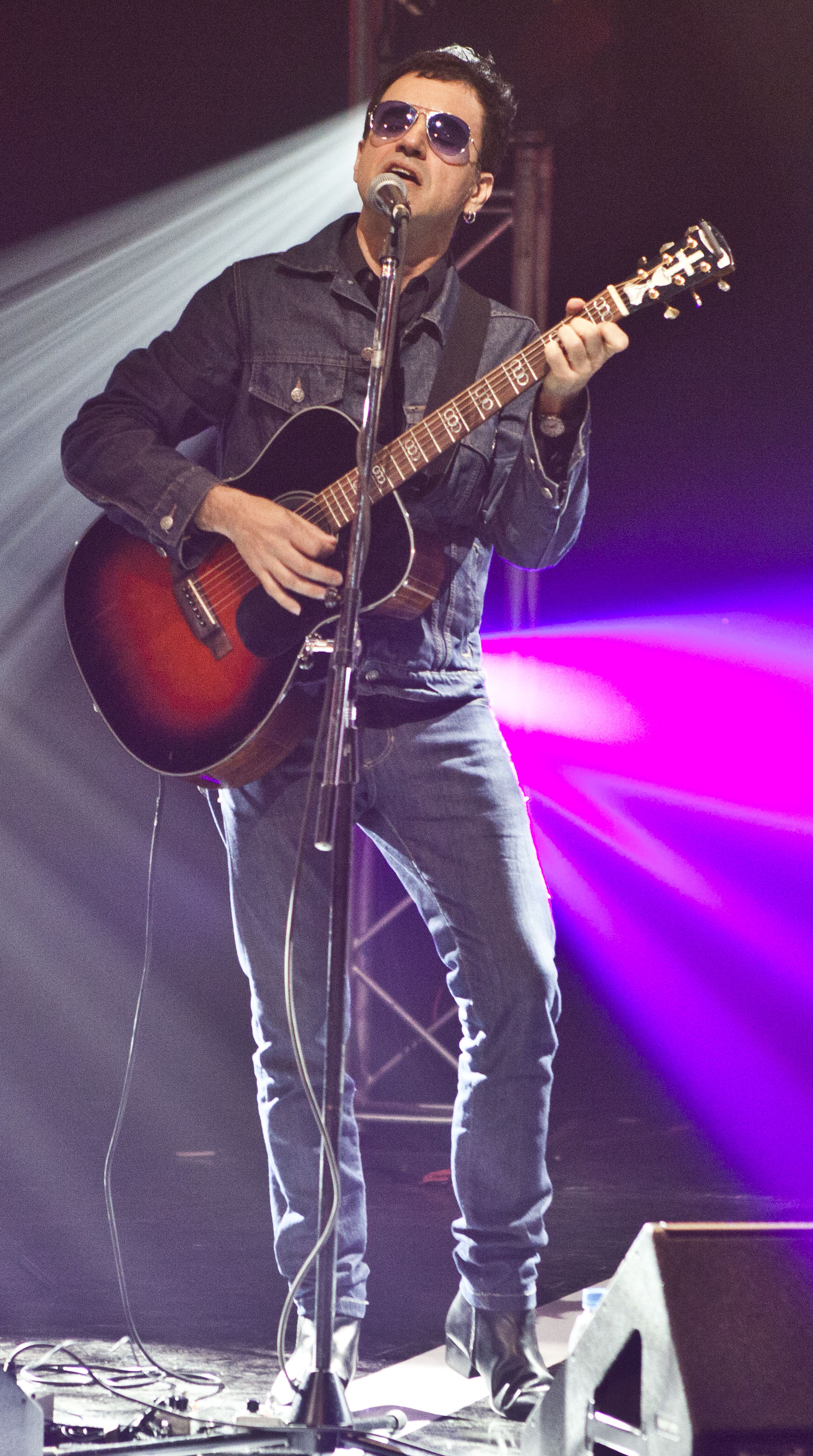 Richard Coleman en 2014.